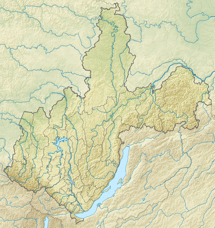 Физическая карта Иркутской области, Россия. Проекция: Меркатор Координаты для GMT: -R95.3/119.6/50.9/64.5 Инструменты: GMT, Inkscape This map may be incomplete, and may contain errors. Don't rely solely on it for navigation.